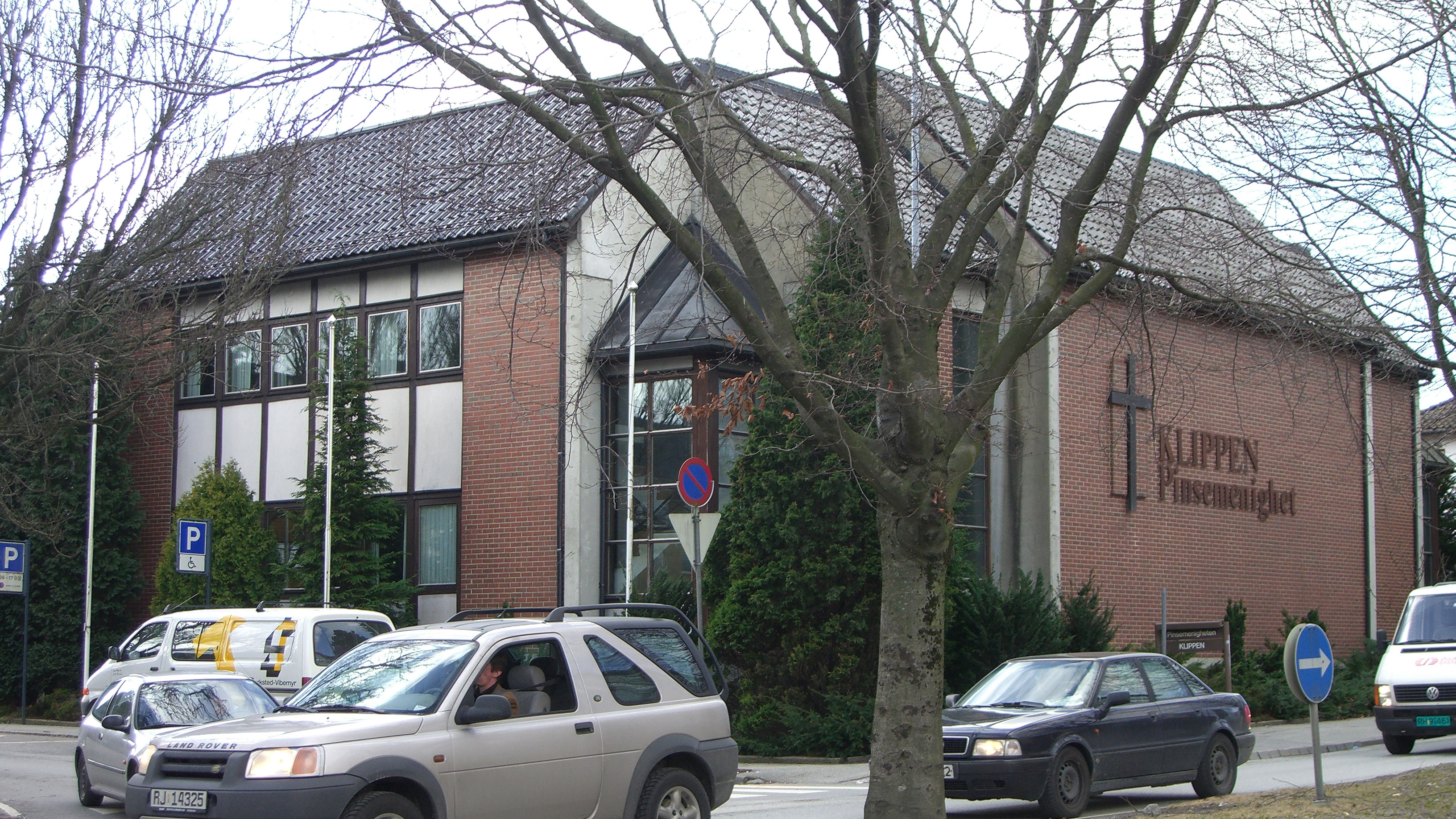 Klippen menighet